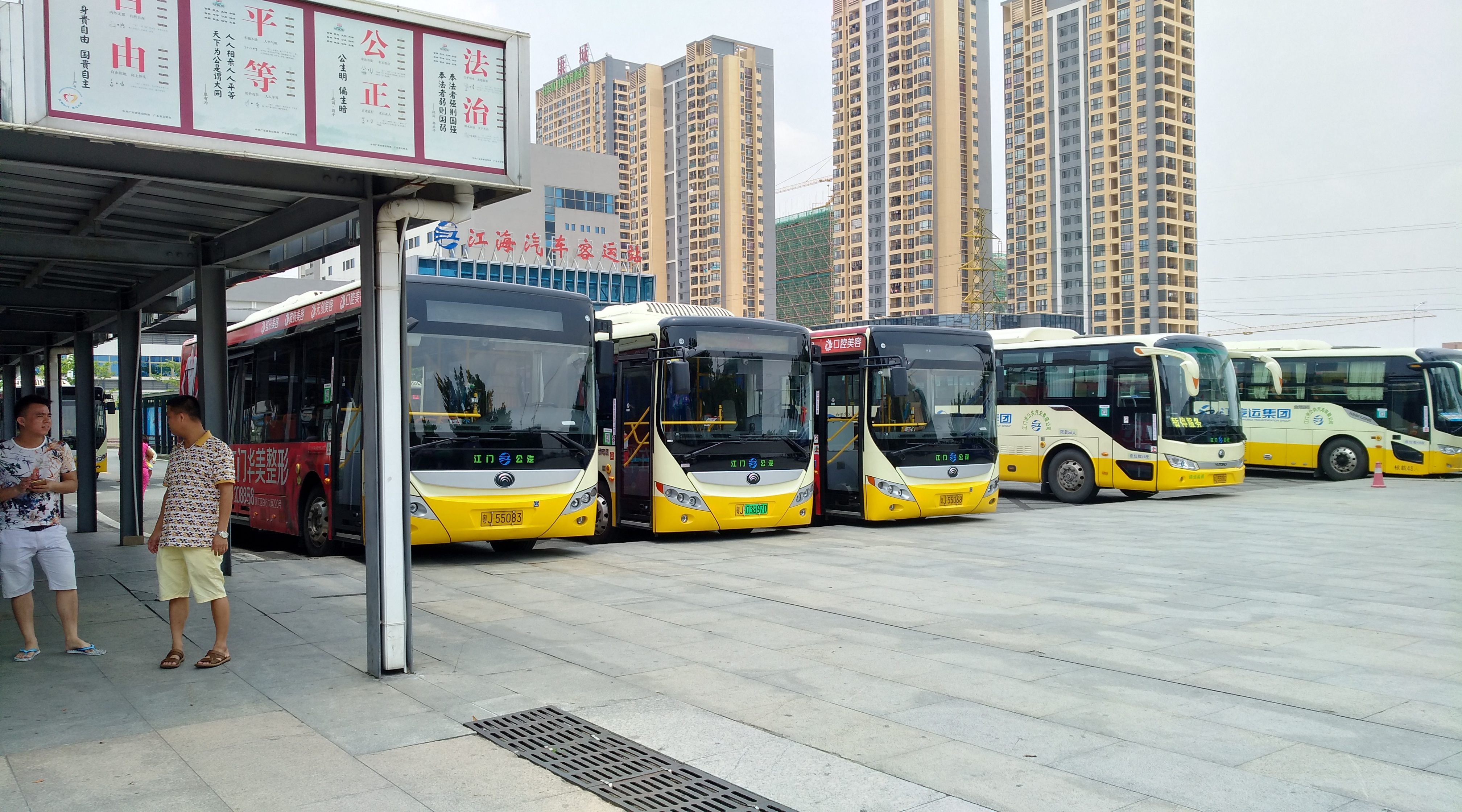 江门公交 城轨江门东站公交总站